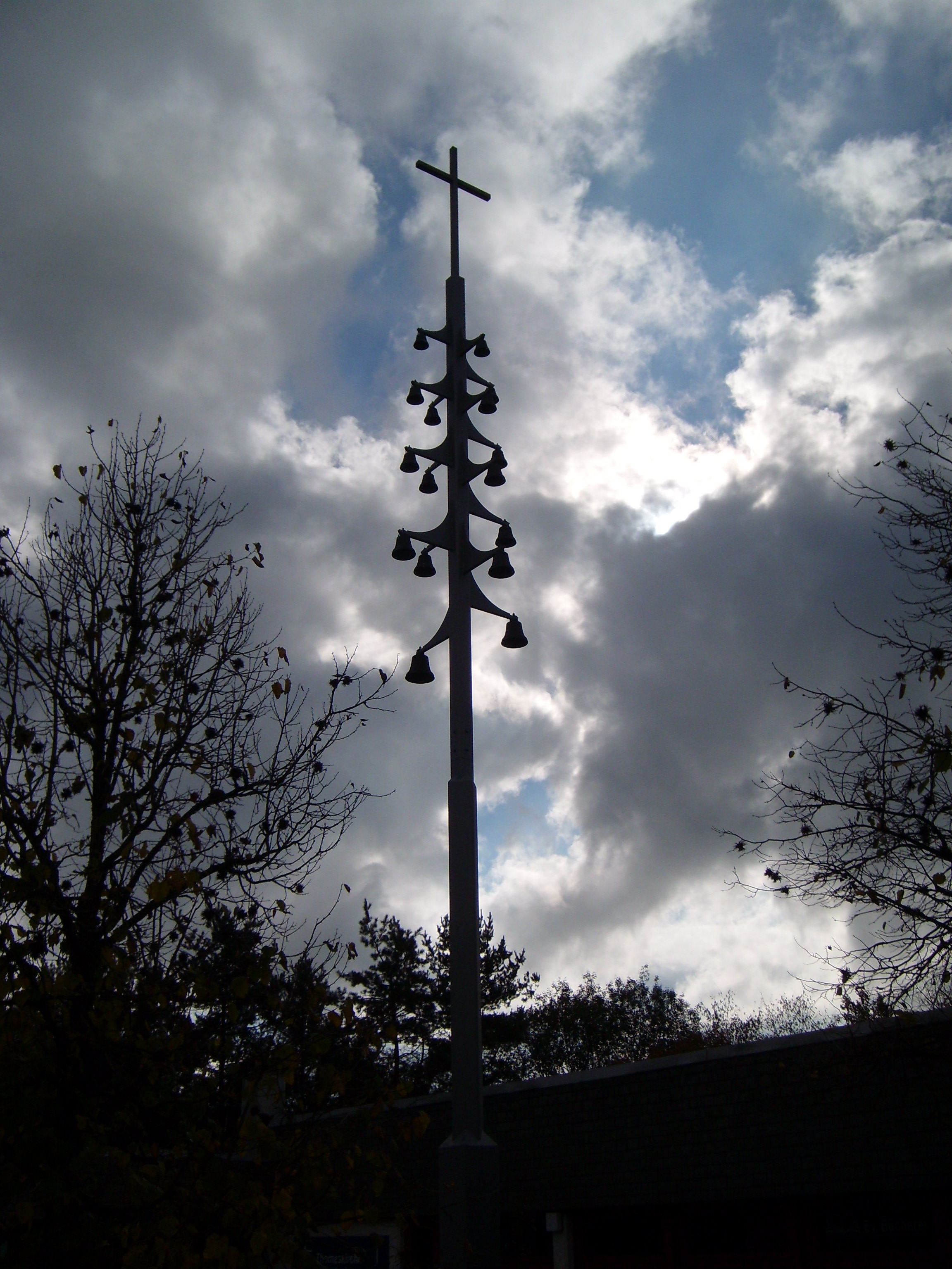 Glockenturm des Ökumenischen Zentrums Thomaskirche Marburg (2007).